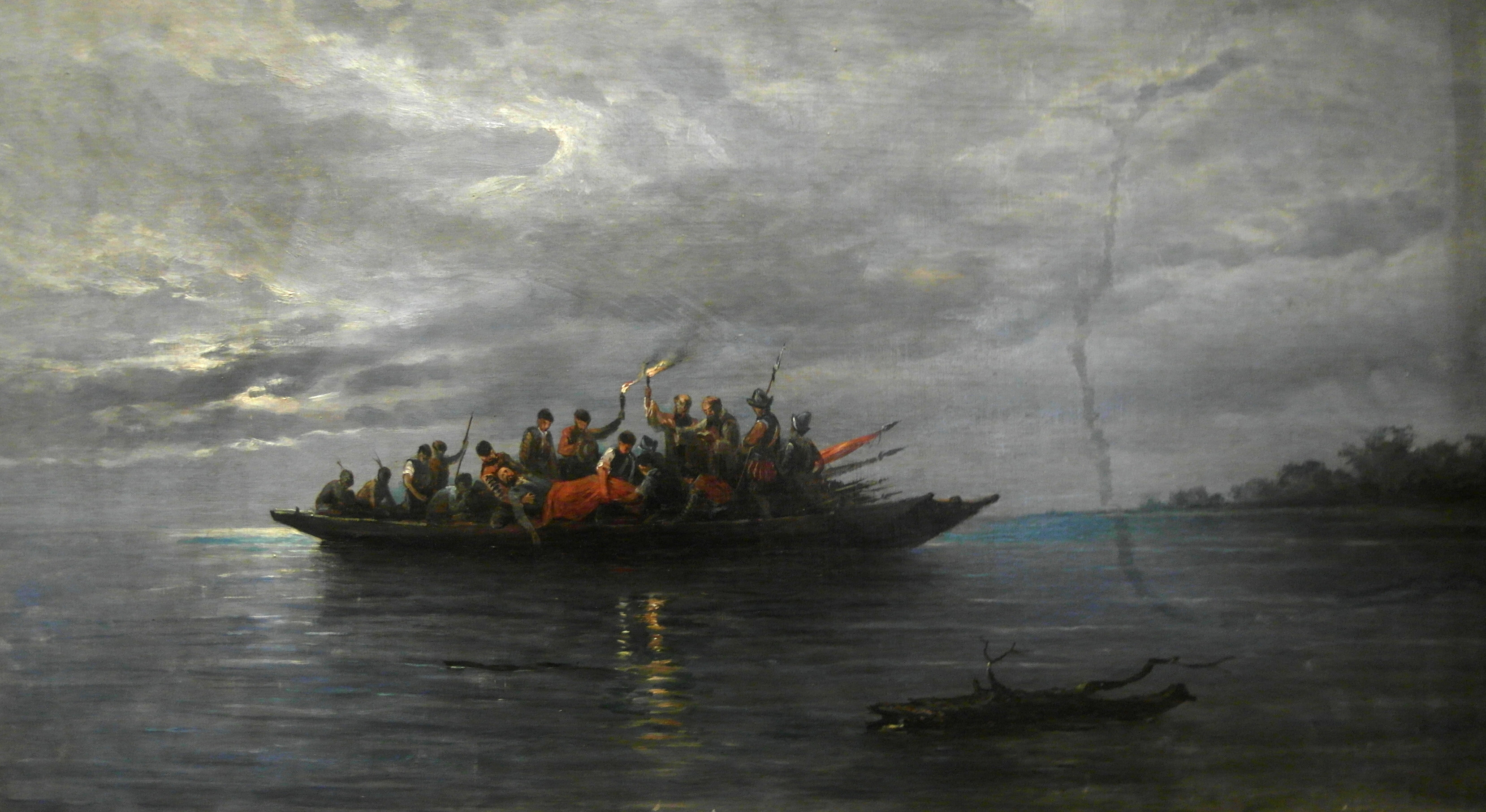 El cadáver de Hernando de Soto es arrojado al río Misisipí, julio de 1542. Cuadro (inexacto) de Rafael Monleón y Torres (1887).